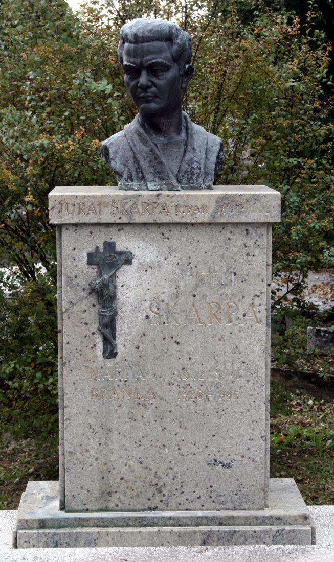 grob kipara Juraja Škarpe na zagrebačkom Mirogoju, Hrvatska